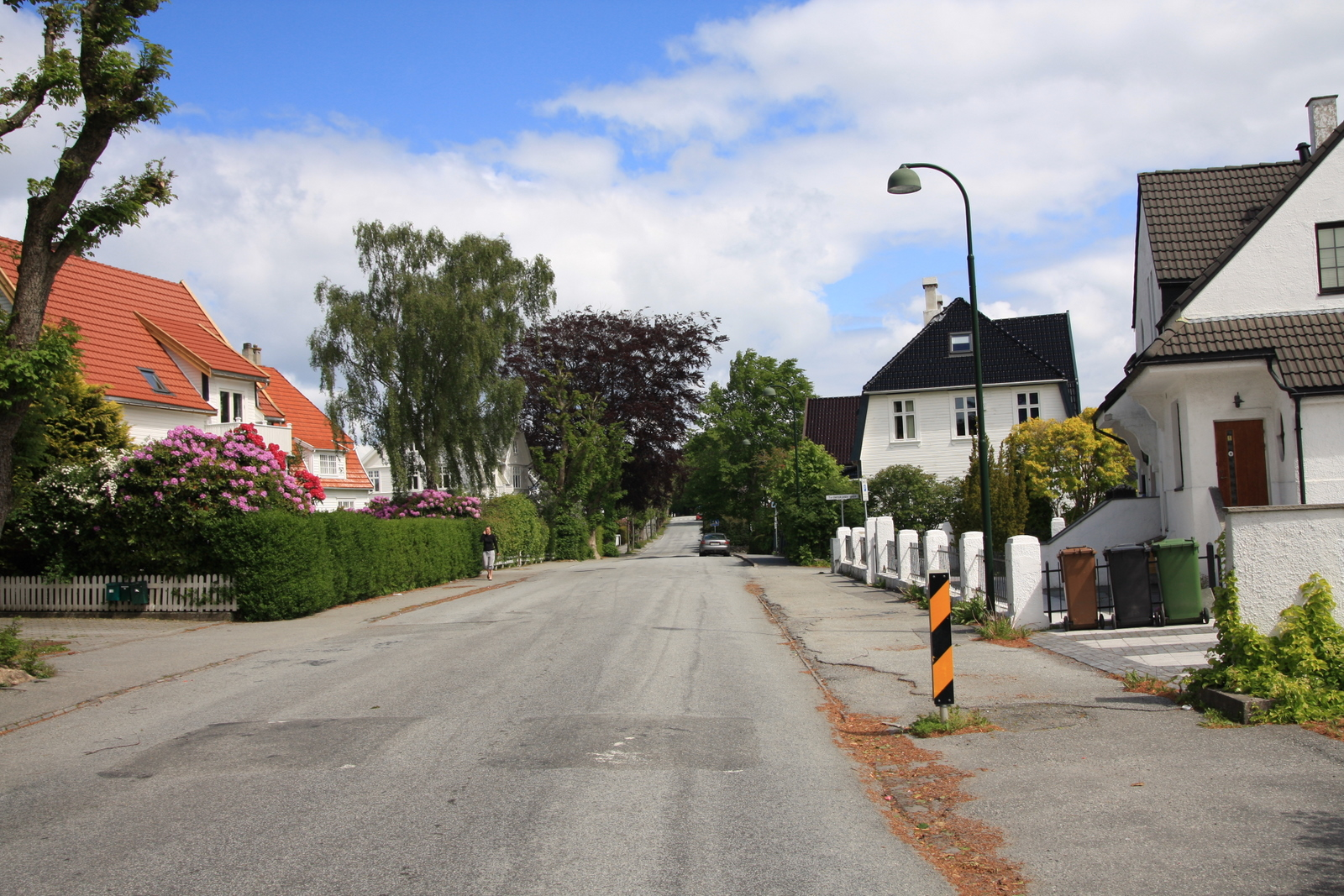 Fylkesvei 419 Rogaland.